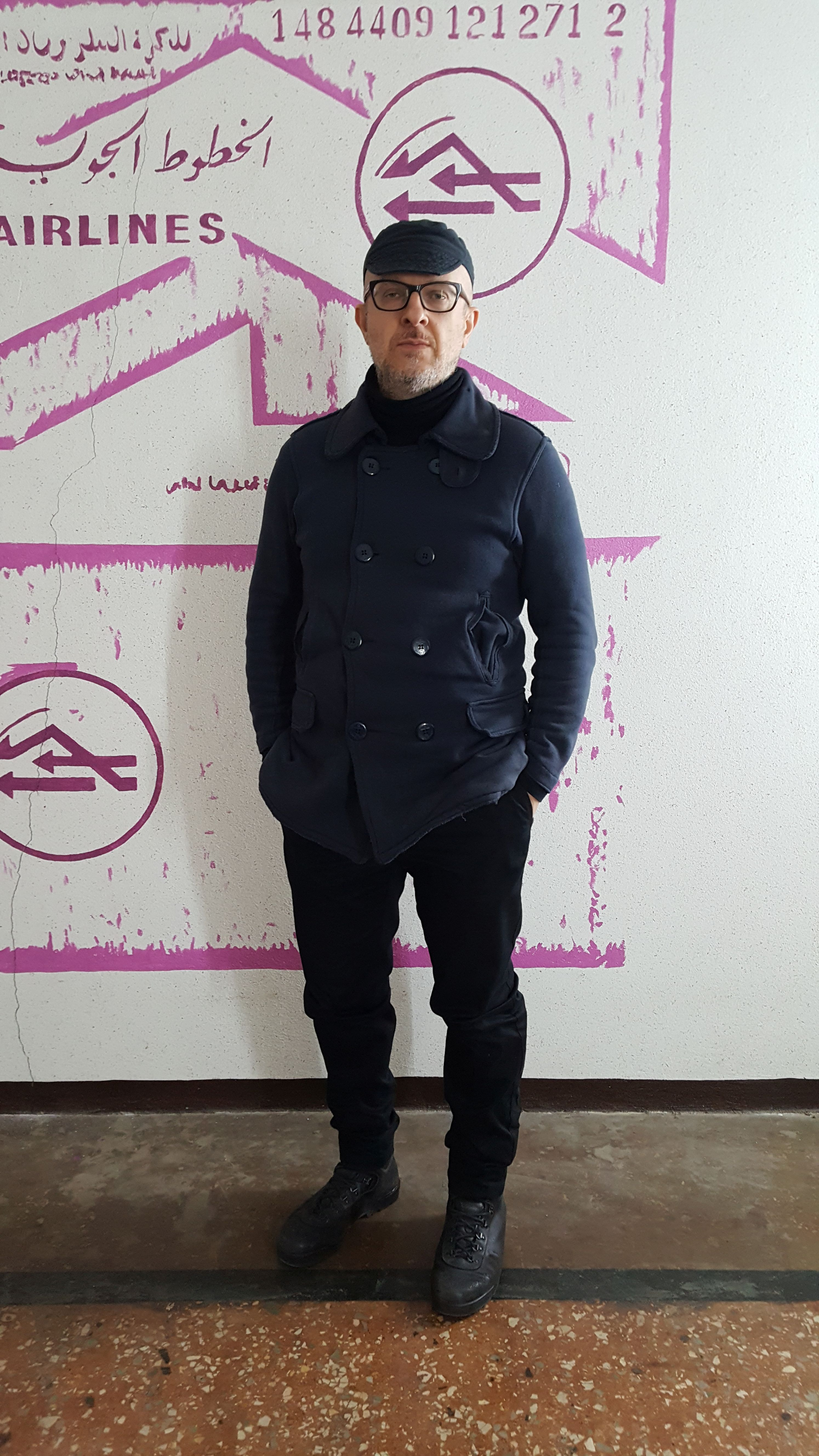 Flavio Favelli nella casa di via Guerrazzi 21